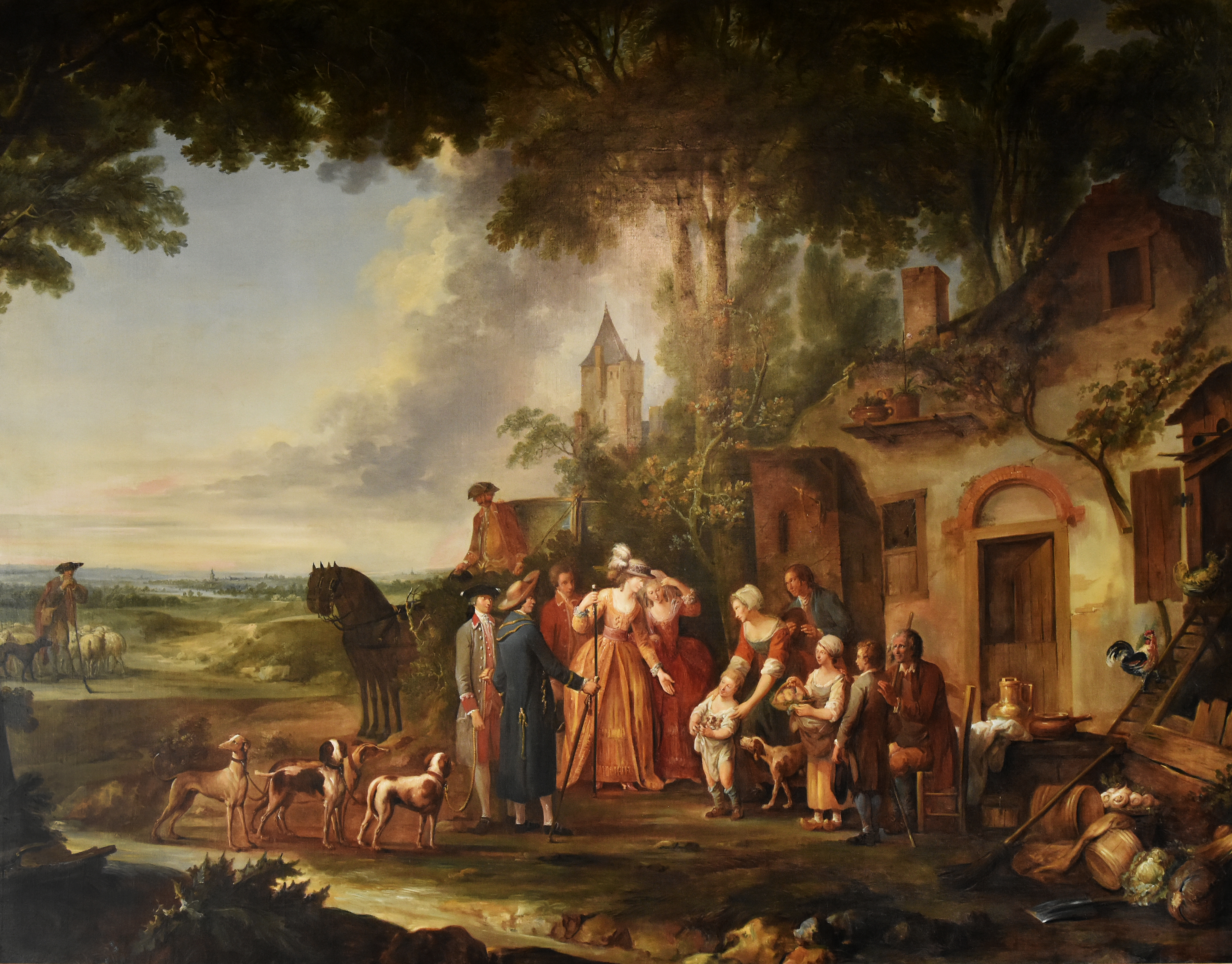 Louis Joseph Watteau (1731-1798) - Het bezoek aan de boerderij - Museum van Sens, Frankrijk